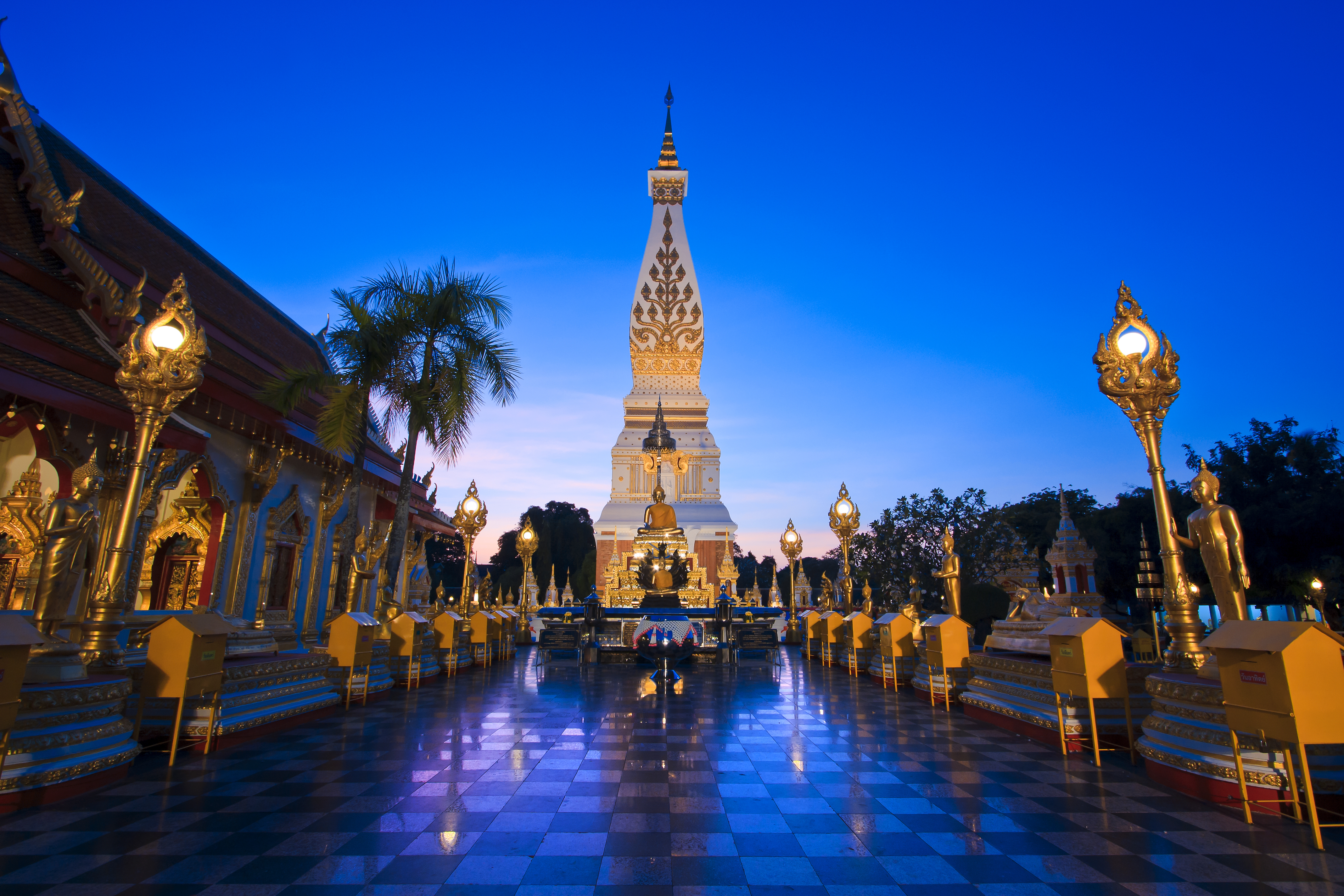 วัดพระธาตุพนมวรมหาวิหาร(พระธาตุพนม)